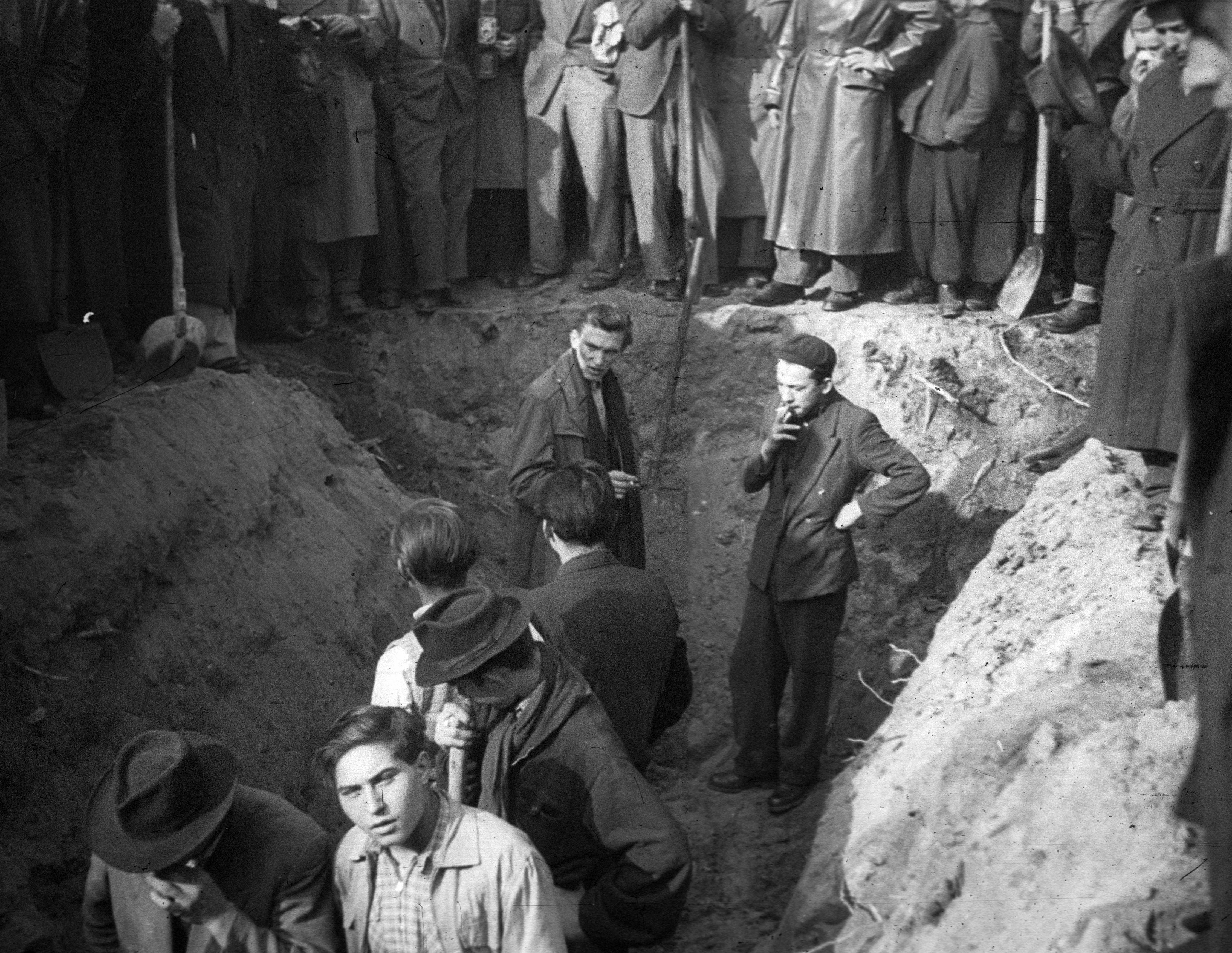 II. János Pál (Köztársaság) tér, a pártházhoz kötődő feltételezett kazamaták keresése. Location: Hungary, Budapest VIII. Tags: revolution, work, curiosity, men, mass, camera, Budapest Title: II. János Pál (Köztársaság) tér, a pártházhoz kötődő feltételezett kazamaták keresése.